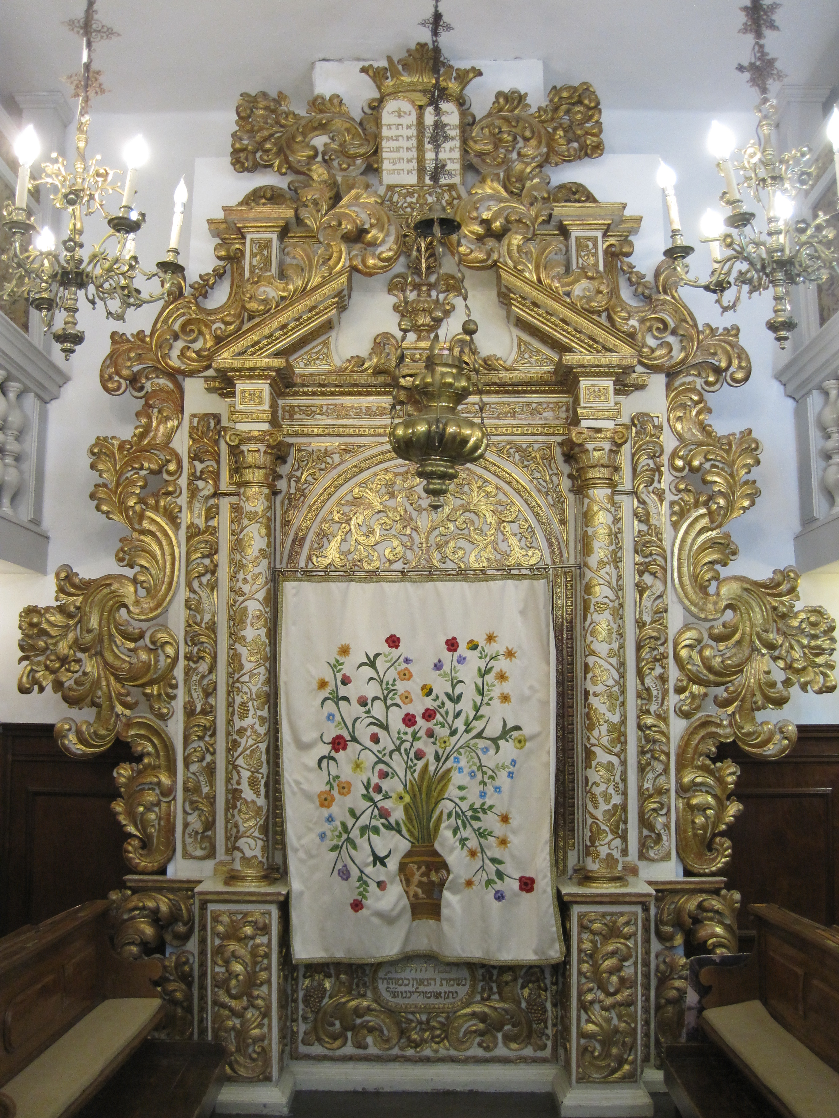 ארון הקודש בבית הכנסת של קוניליאנו